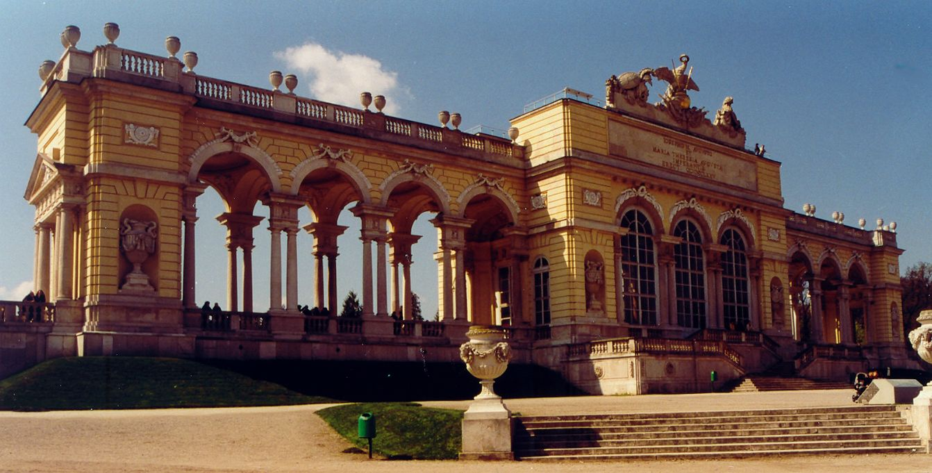 Schönbrunn Glorietta, fot. Chepry (Andrzej Barabasz) 2002 r. Attribution-ShareAlike 2.0